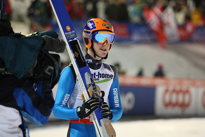 Akos Szilagyi podczas serii kwalifikacyjnej do konkursu Mistrzostw Świata 2013 na skoczni normalnej